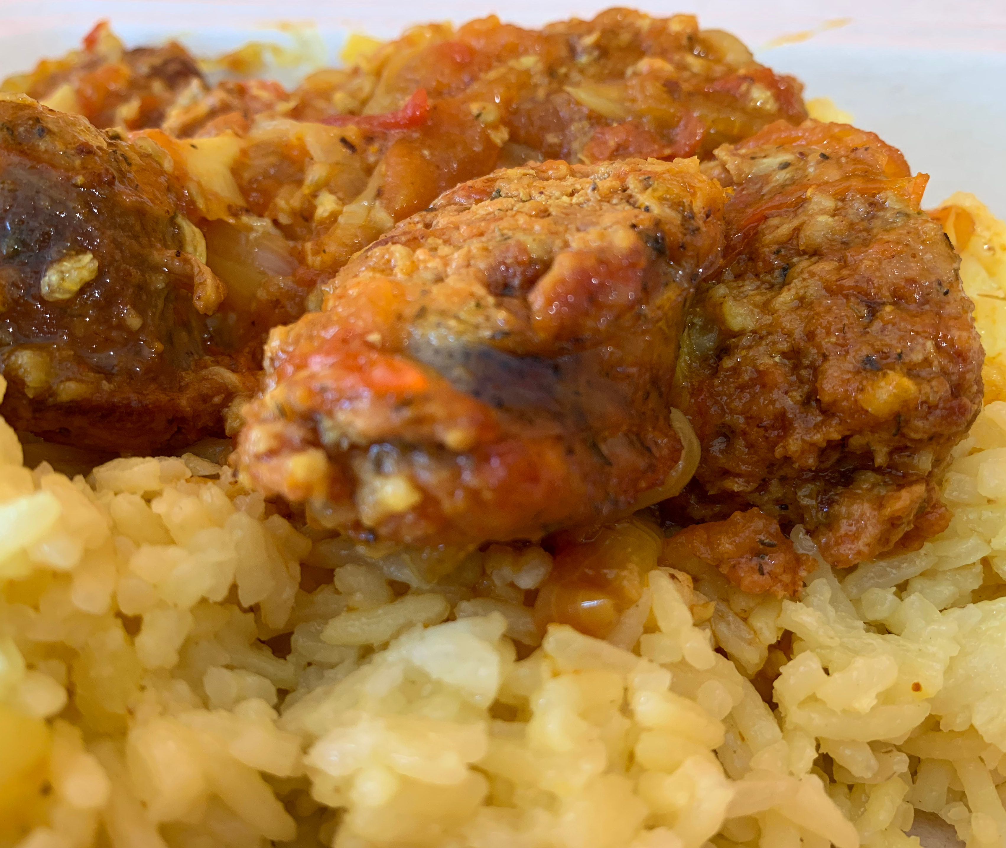 Rougail saucisse et riz zambrocal.